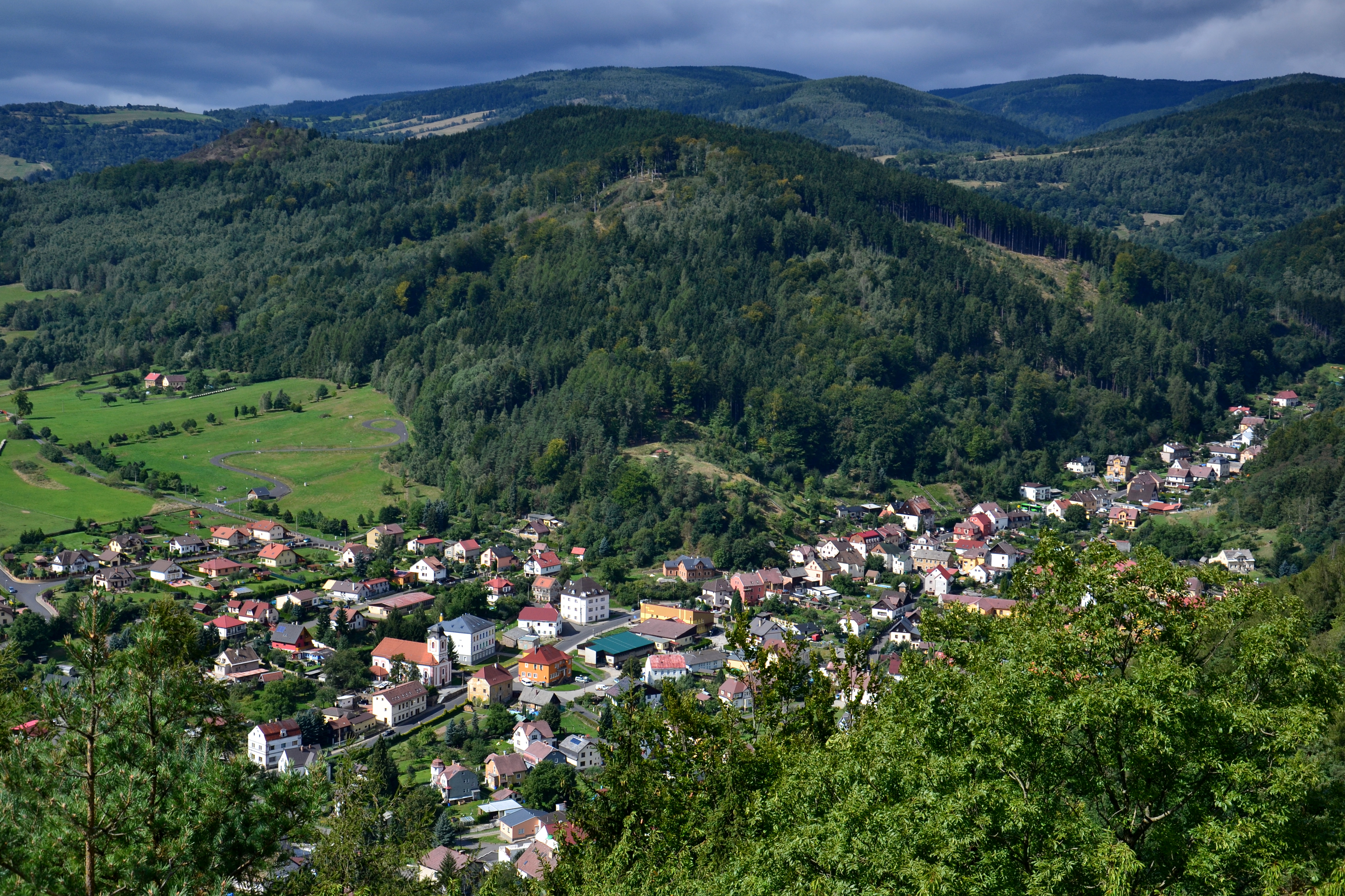 Perštejn z vrchu Hradiště